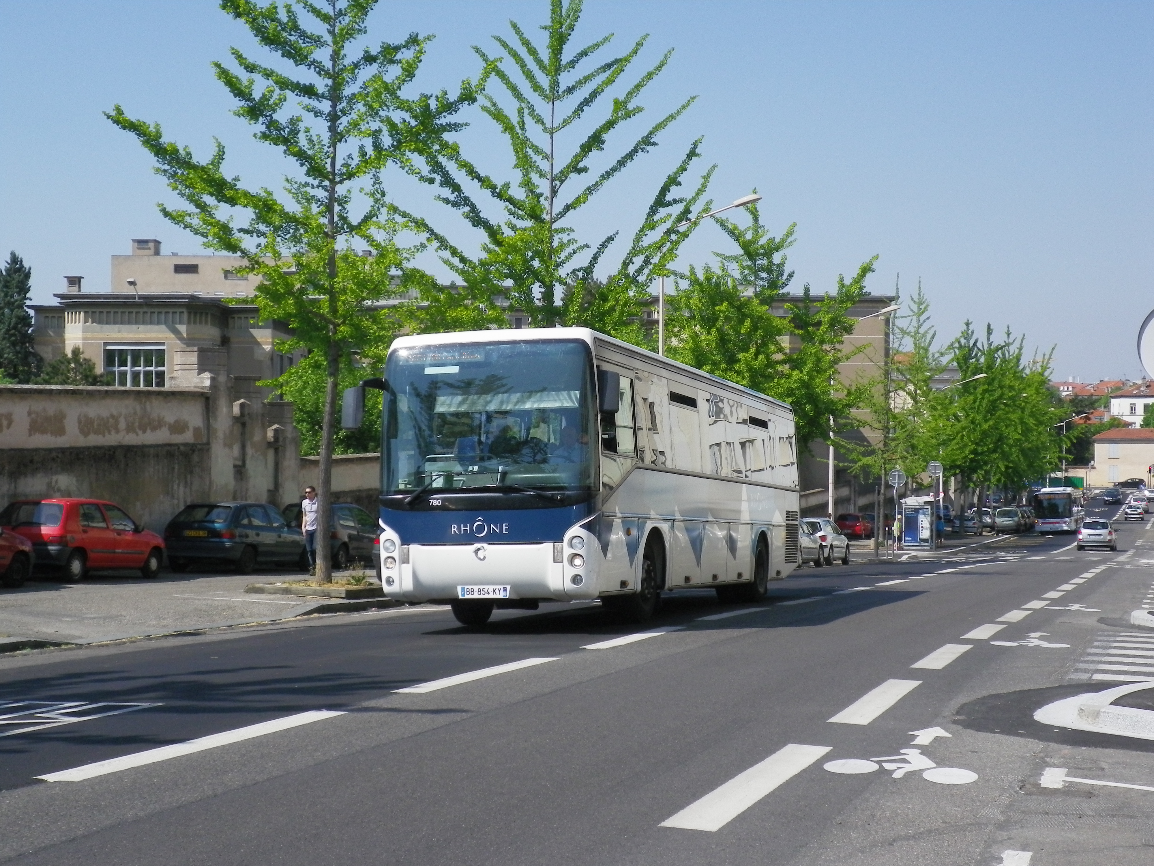 Ligne 165 des Cars du Rhône, à proximité de Grange Blanche